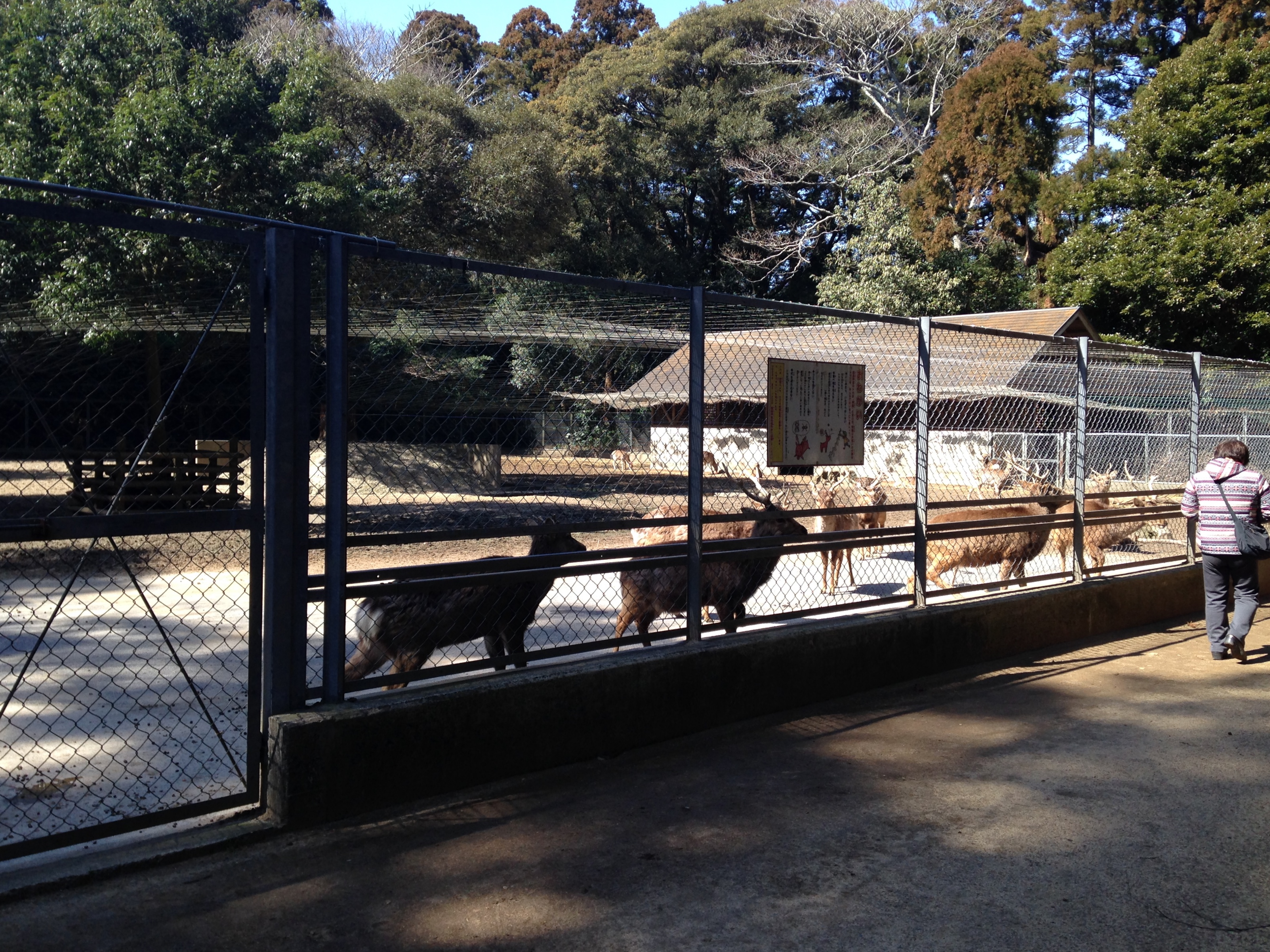 鹿島神宮・鹿園